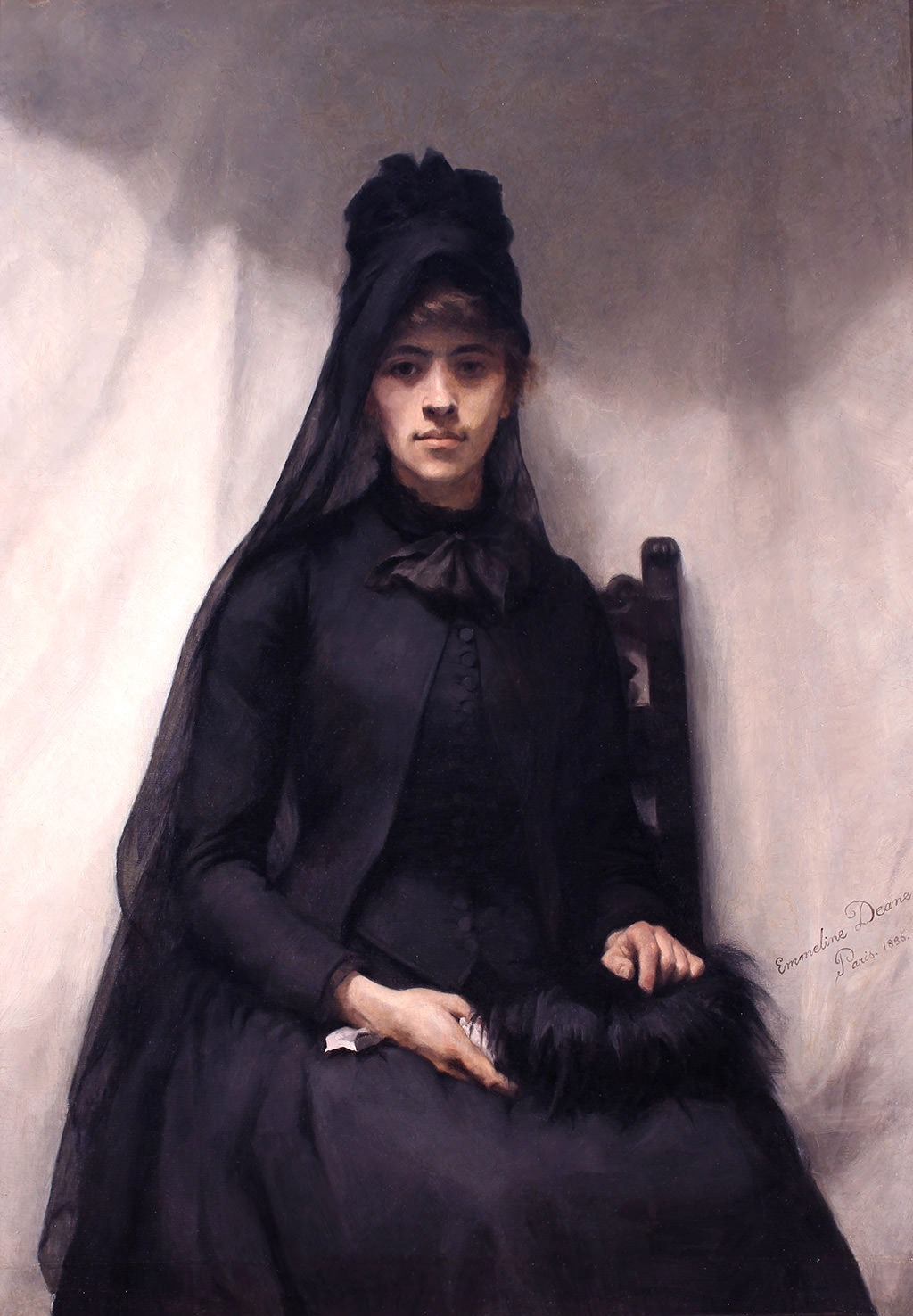 Портрет художниці Anna Bilinska, полотно, олія, 128 на 90,7 см